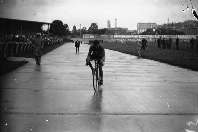 Bordeaux-Paris 1931 : le sprint de Van Rysselberghe